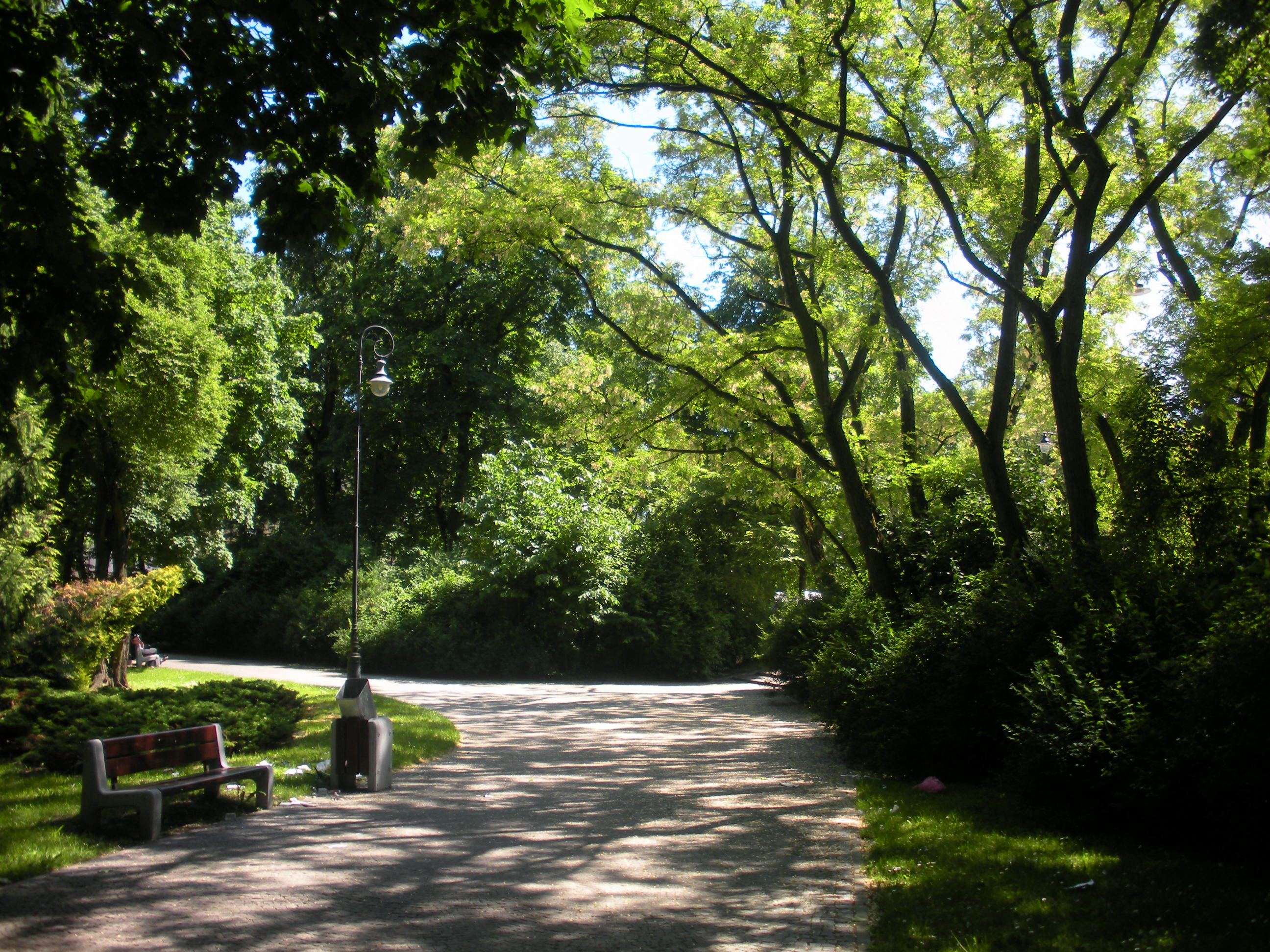 Park Poniatowskiego w Białymstoku od strony ulicy Adama Mickiewicza.